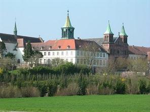 Abbaye Notre-Dame d'Oelenberg